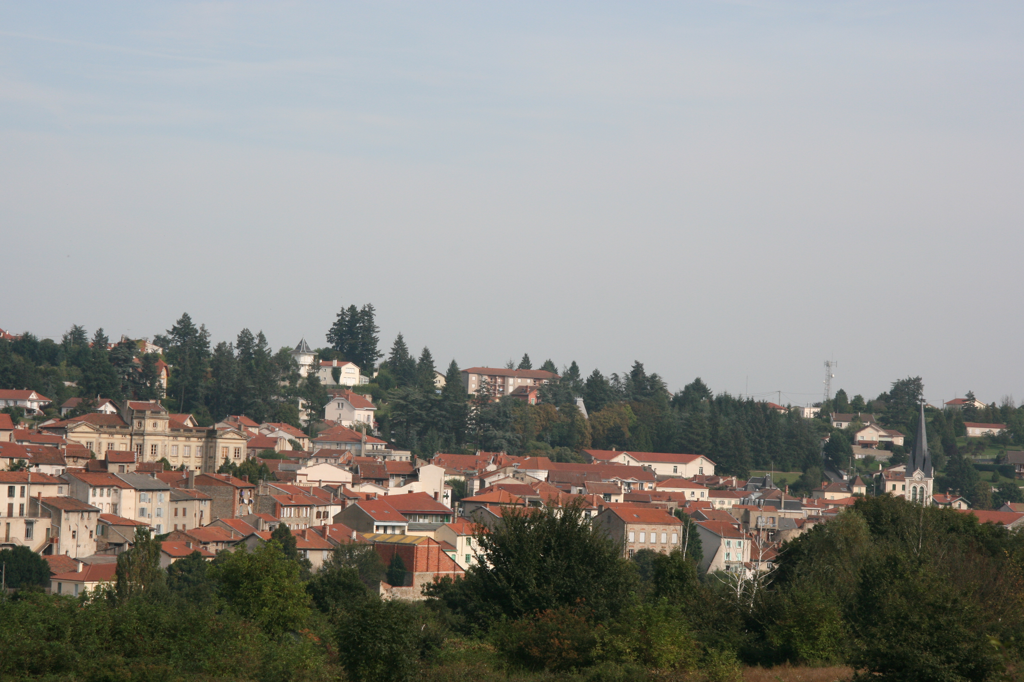 Vue générale de Boën (ou Boën-sur-Lignon), commune du département de La Loire, France